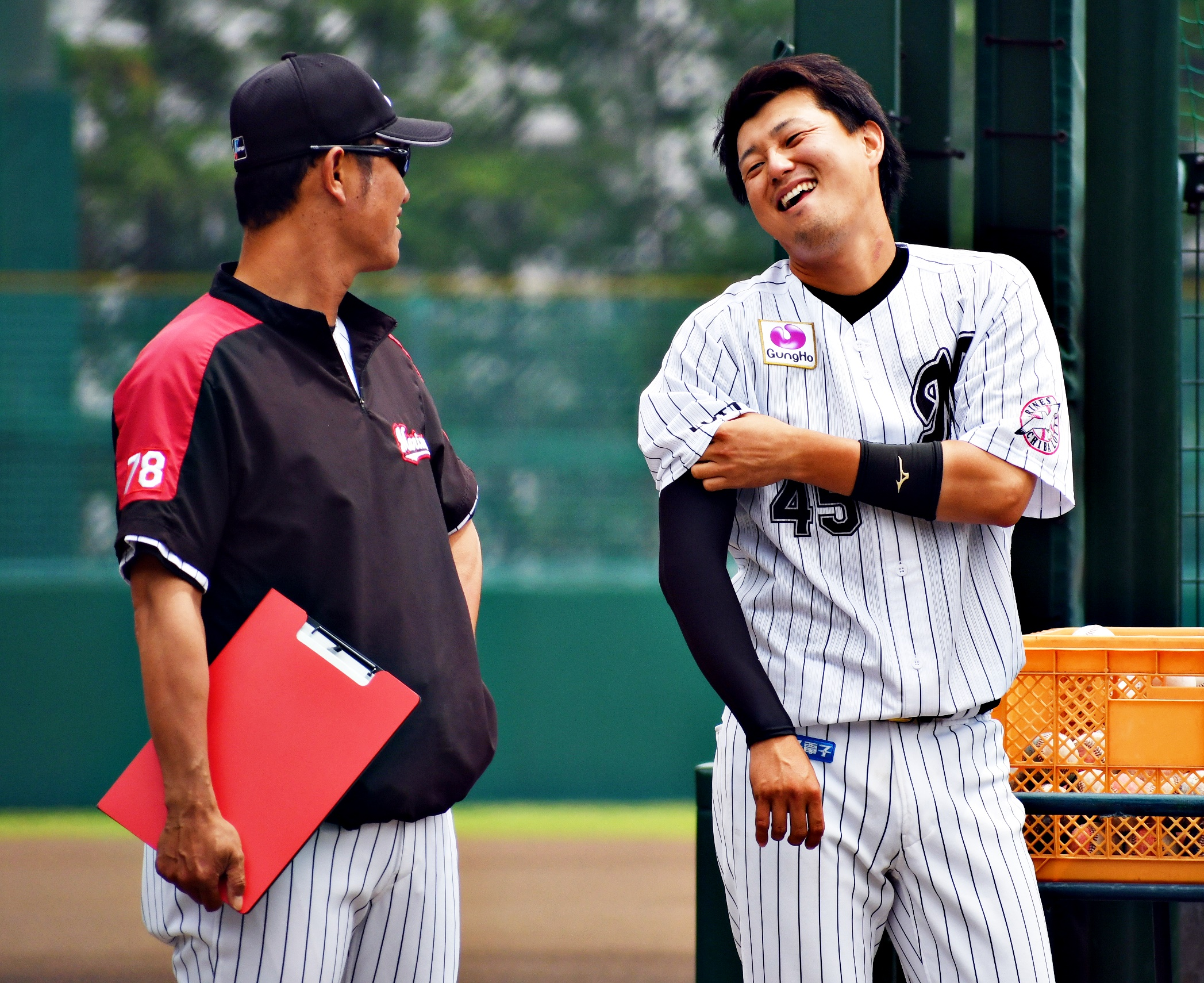 千葉ロッテマリーンズの宗接唯人捕手